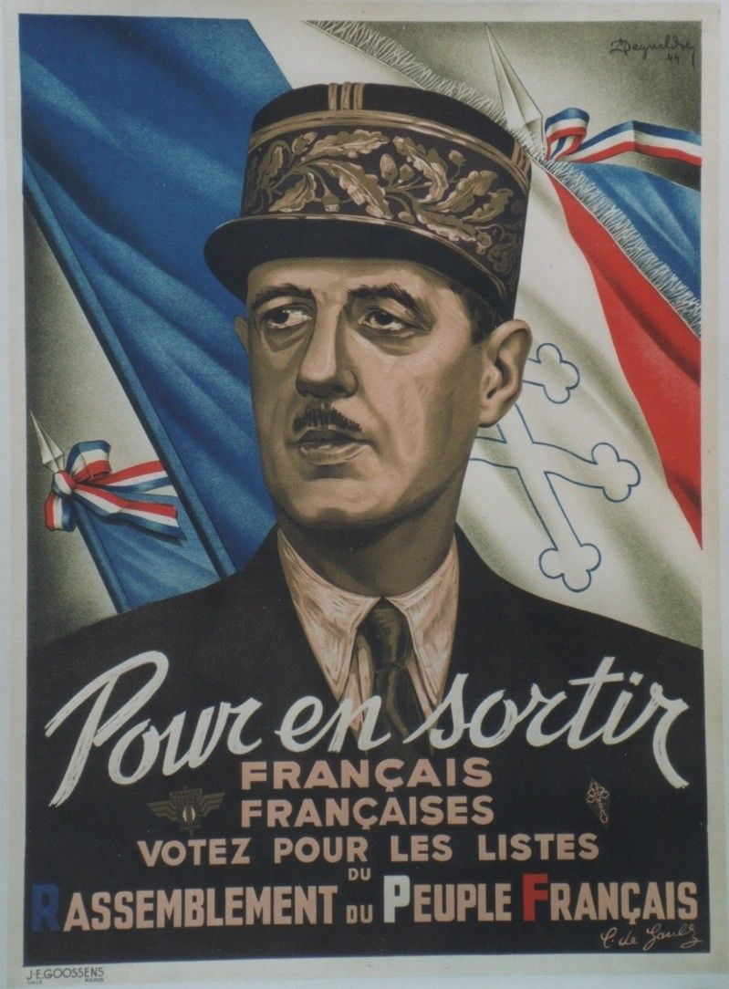 Affiche du R.P.F. : “Pour en sortir Français, Françaises, votez pour les listes Rassemblement du Peuple Français”. Charles de Gaulle. Lithographie de M. Deguelche, imprimerie J.E. Goossens, Paris, 1944-1947, 80 x 59 cm.